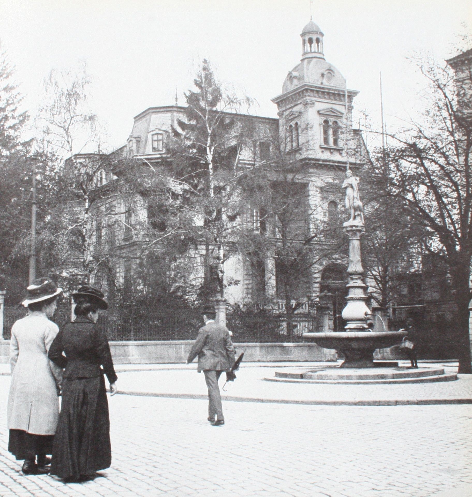 Villa Windegg am 23. April 1910, gehörte Seidenhändler Robert Schwarzenbach-Zeuner, an der Stelle des Seidenhauses Grieder. 1910 abgebaut und an der Bellerivestrasse 10 wieder aufgebaut.